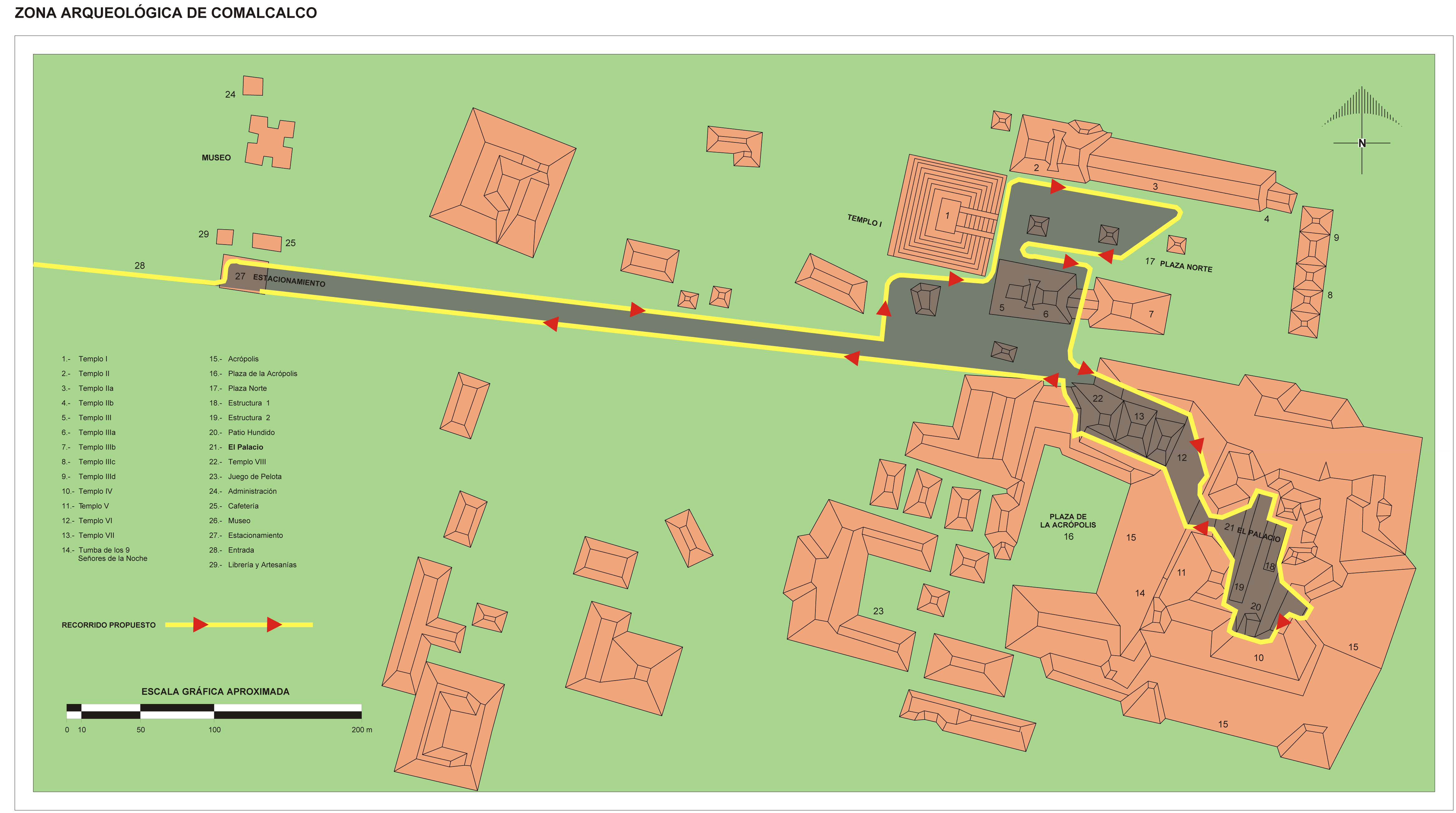 Mapa de la zona arqueológica de Comalcalco, Tabasco, México.